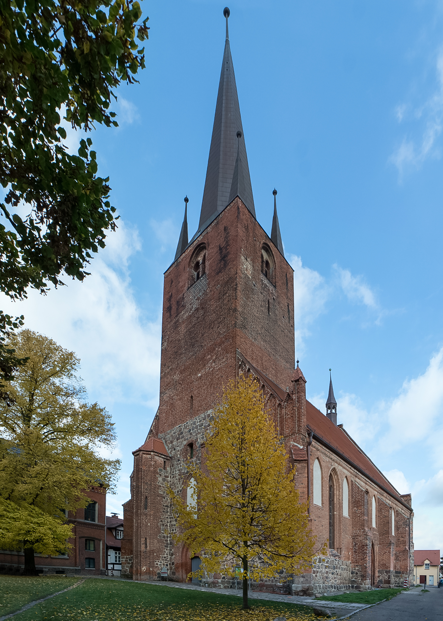 St. Petri-Kirche in Stendal